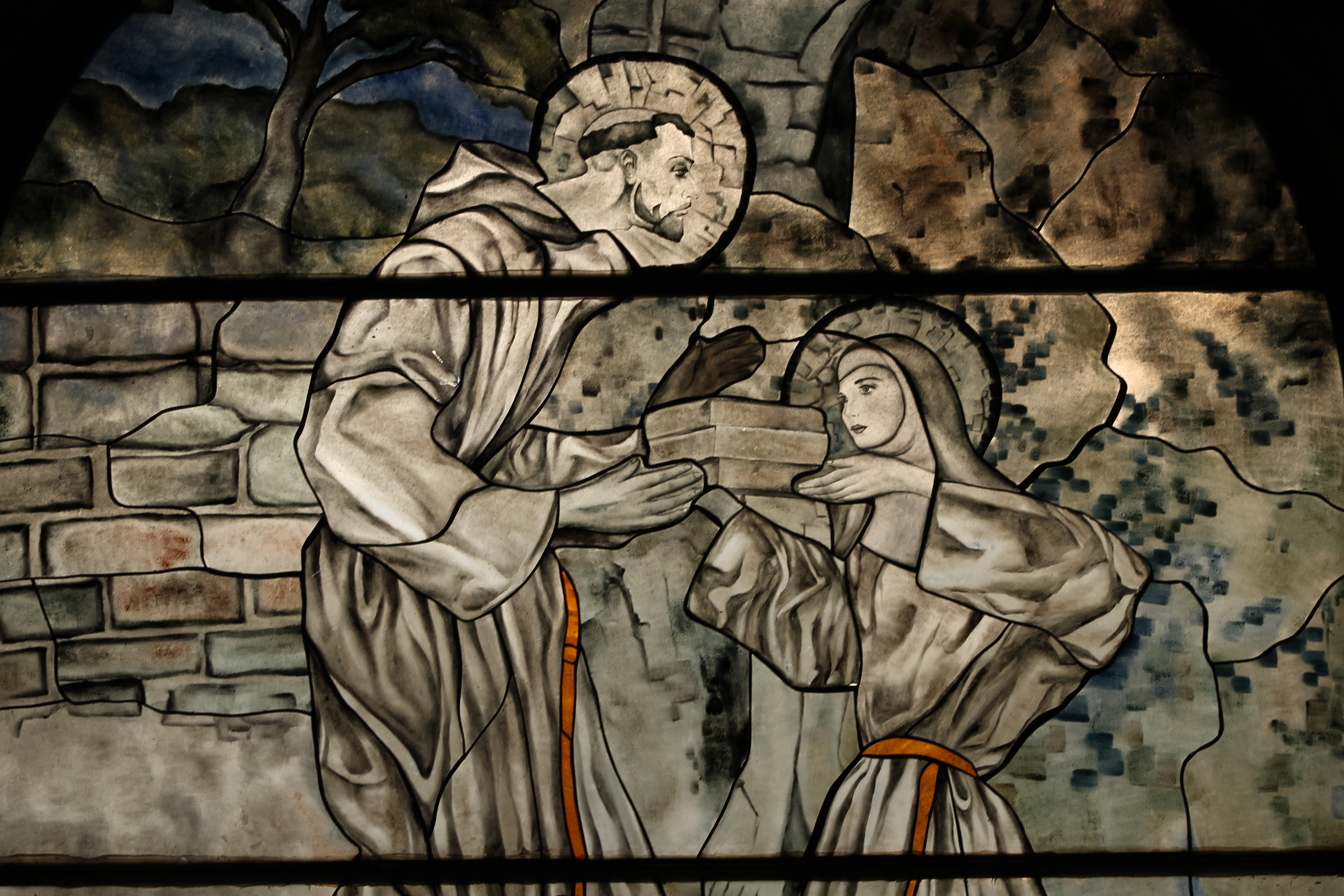 Detalle de vitral de San Francisco de Asís en la Iglesia de San Francisco Corupo